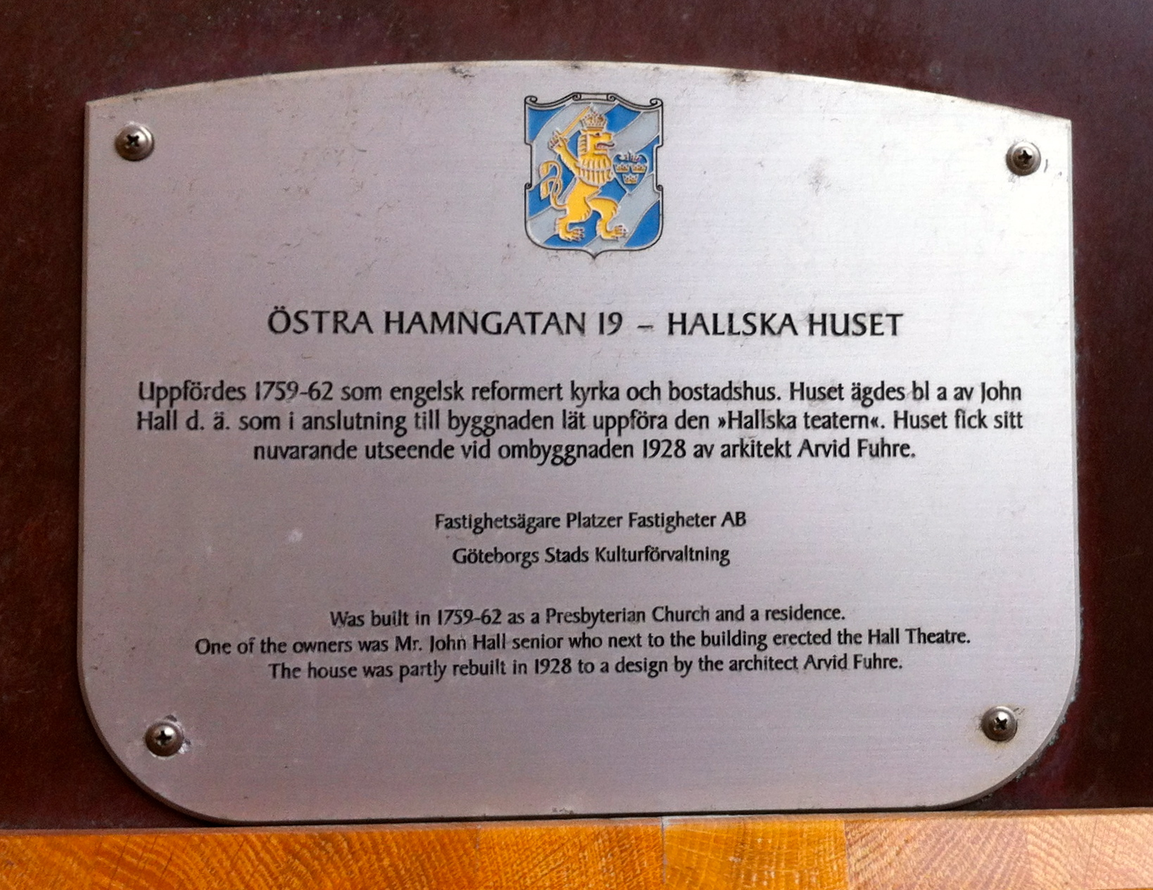 Hallska huset vid Östra Hamngatan 19 i Göteborg. Plaketten sattes upp som en del av Göteborgs stads kulturnämnds "Projekt Husmärkning" kring åren 2000-2001 där drygt hundra skyltar ingick. Se även boken "100 utmärkta hus i Göteborg". Vid en inventering av kommunen gjord 2016 satt 69 skyltar fortfarande uppe.